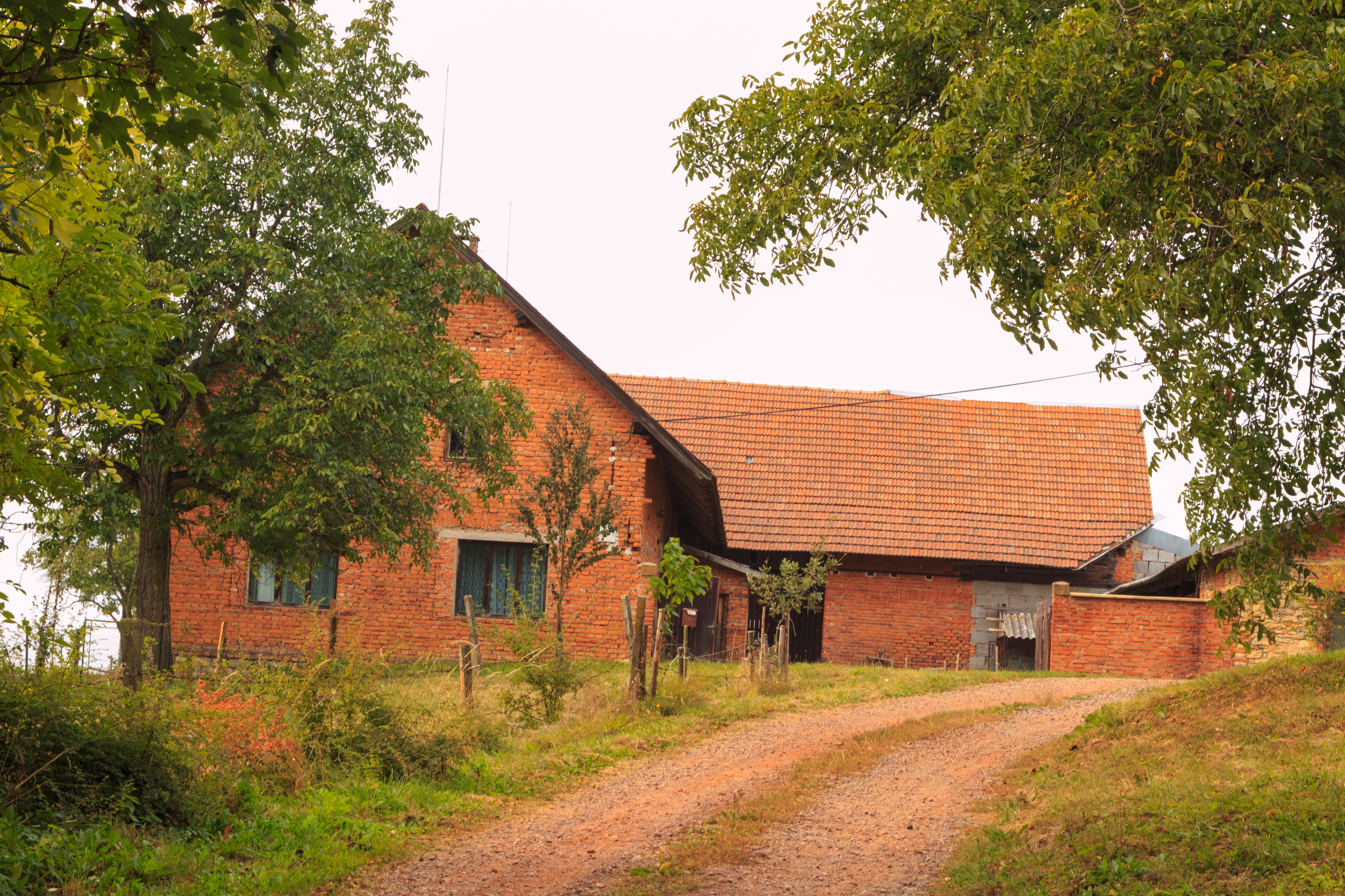 Kaliště u Orlického Podhůří - čp. 6